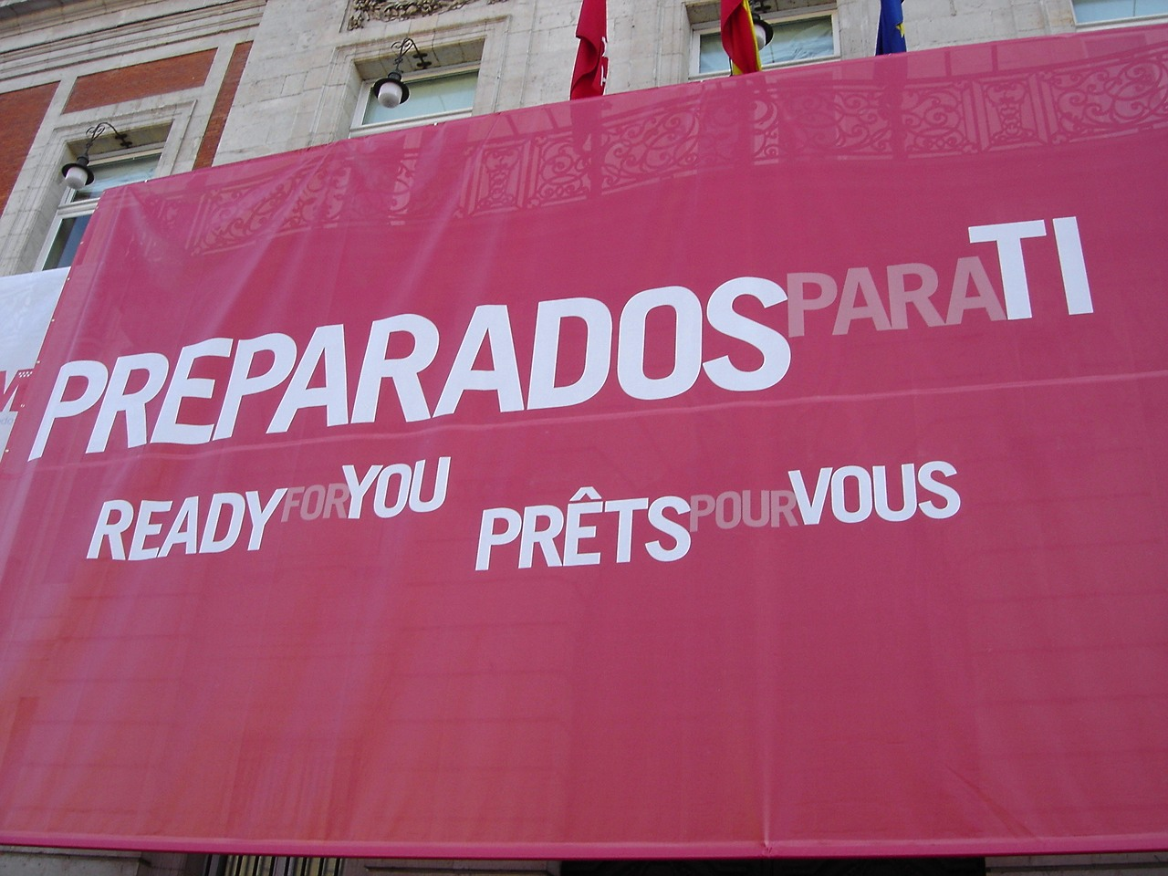 Cartel con el eslogan de la candidatura olímpica Madrid 2012. Madrid, Puerta del Sol, Sede de la Comunidad Autónoma de Madrid.